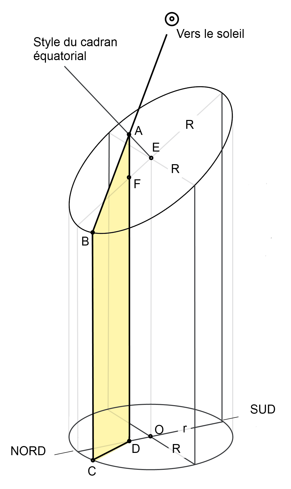 Ce schéma indique le principe de construction du cadran analemmatique et explique son mode de fonctionnement.